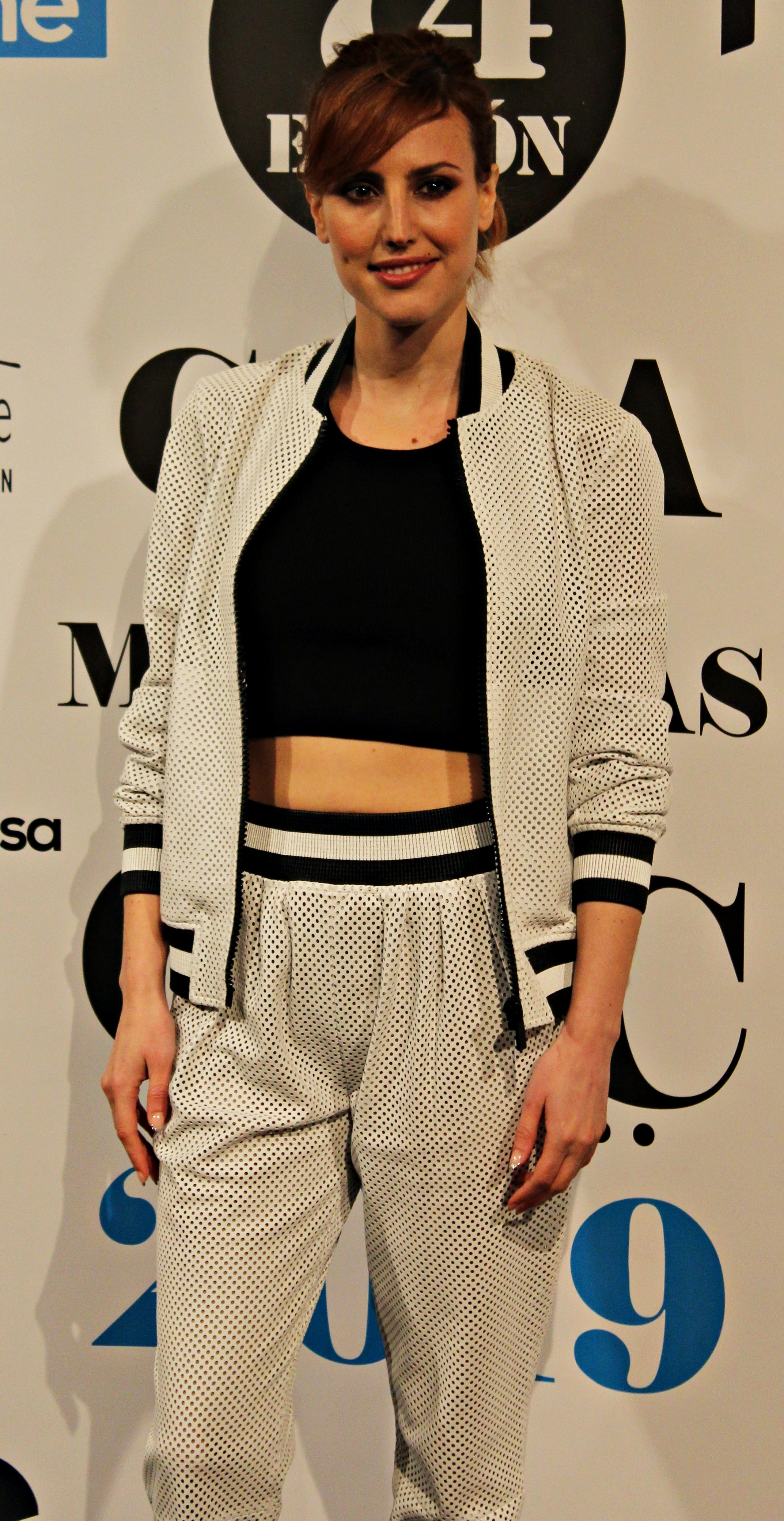 La actriz española Natalia de Molina en la 74 edición de las Medallas del Círculo de Escritores Cinematográficos, donde había sido nominada al premio a la mejor actriz secundaria por su interpretación en la película Quién te cantará.